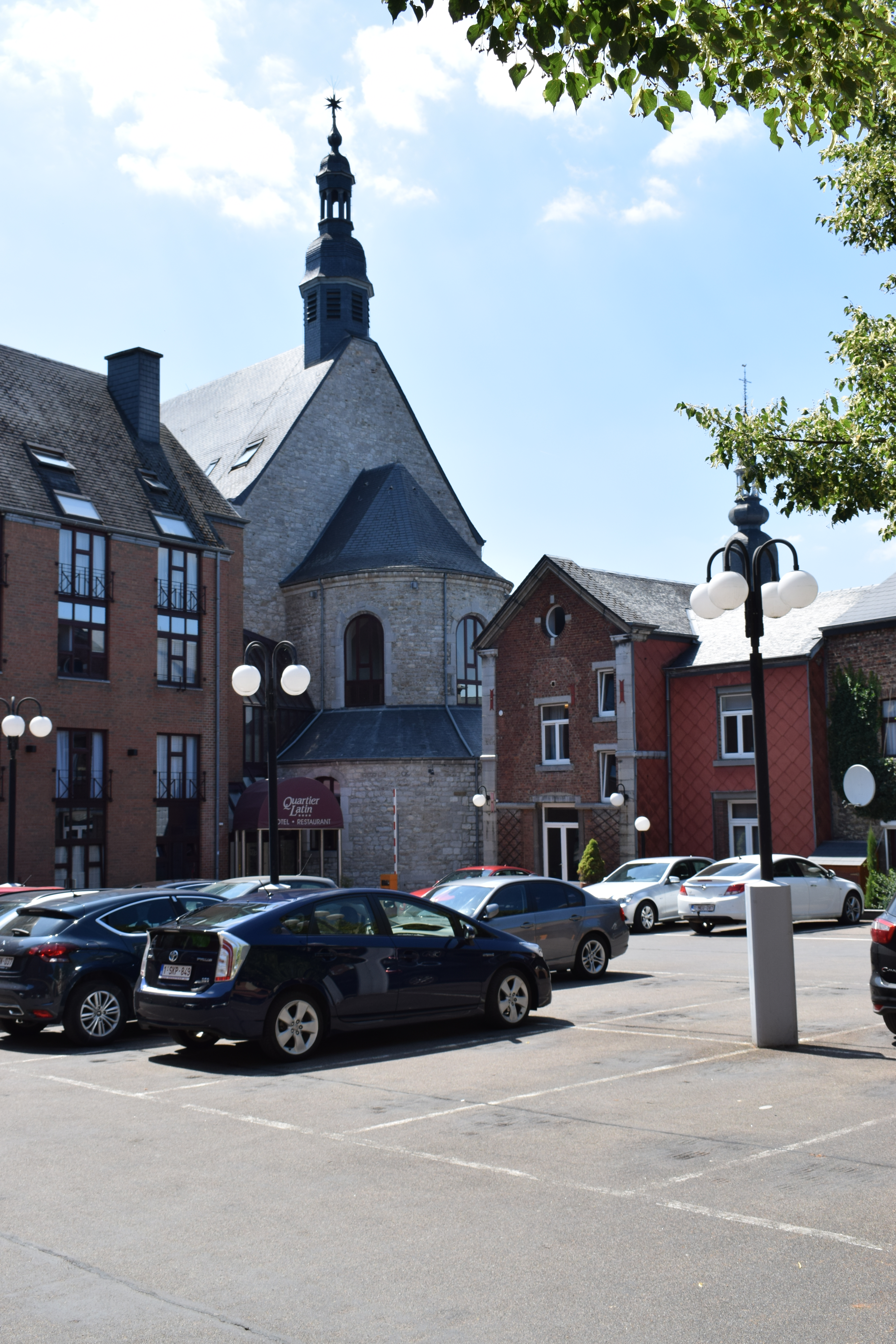 Vue de Marche-en-Famenne, dans la province de Luxembourg (Belgique).